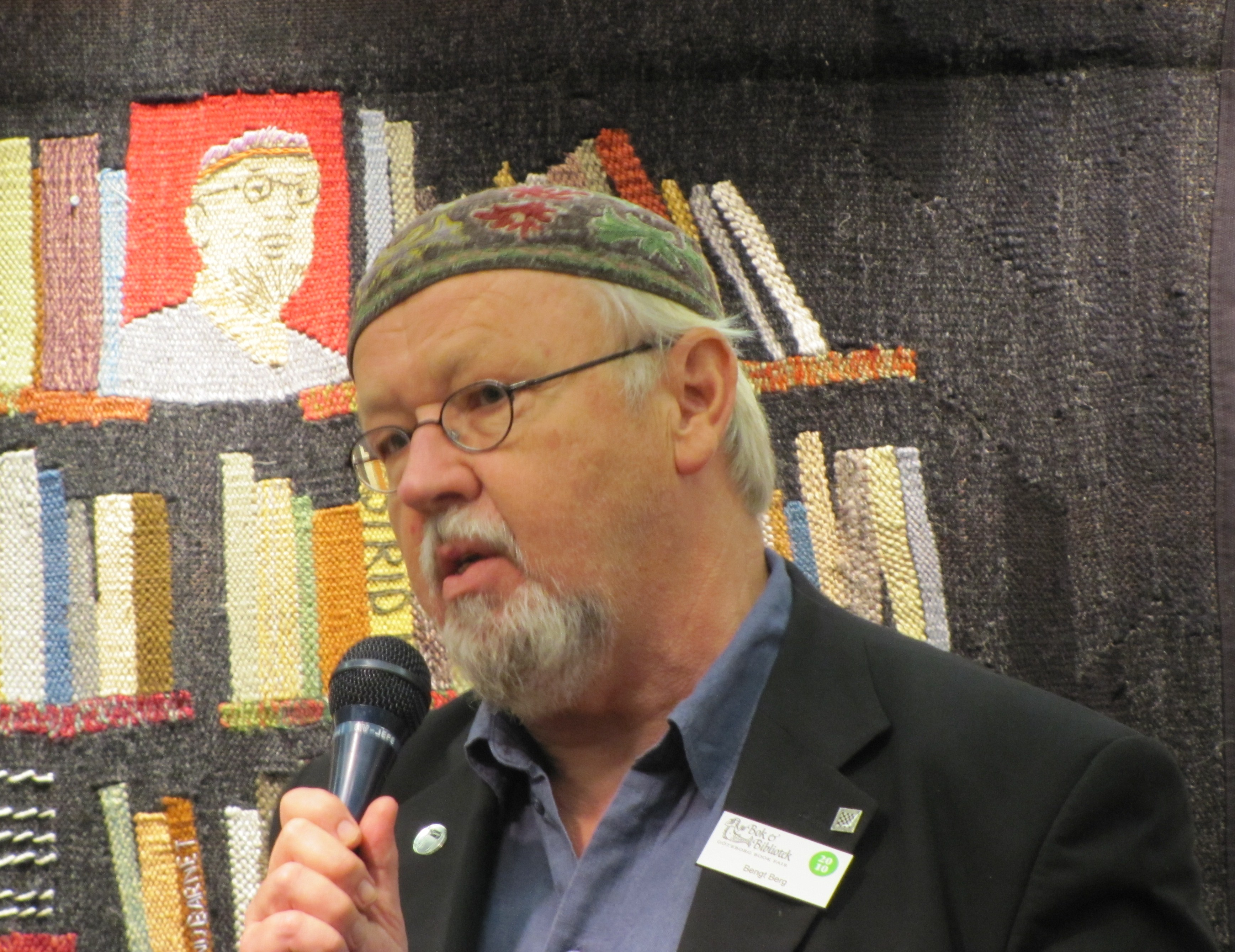 Poeten och författaren Bengt Berg på Bokmässan 2010, bara några dagar efter att han invalts till Sveriges riksdag för Vänsterpartiet.